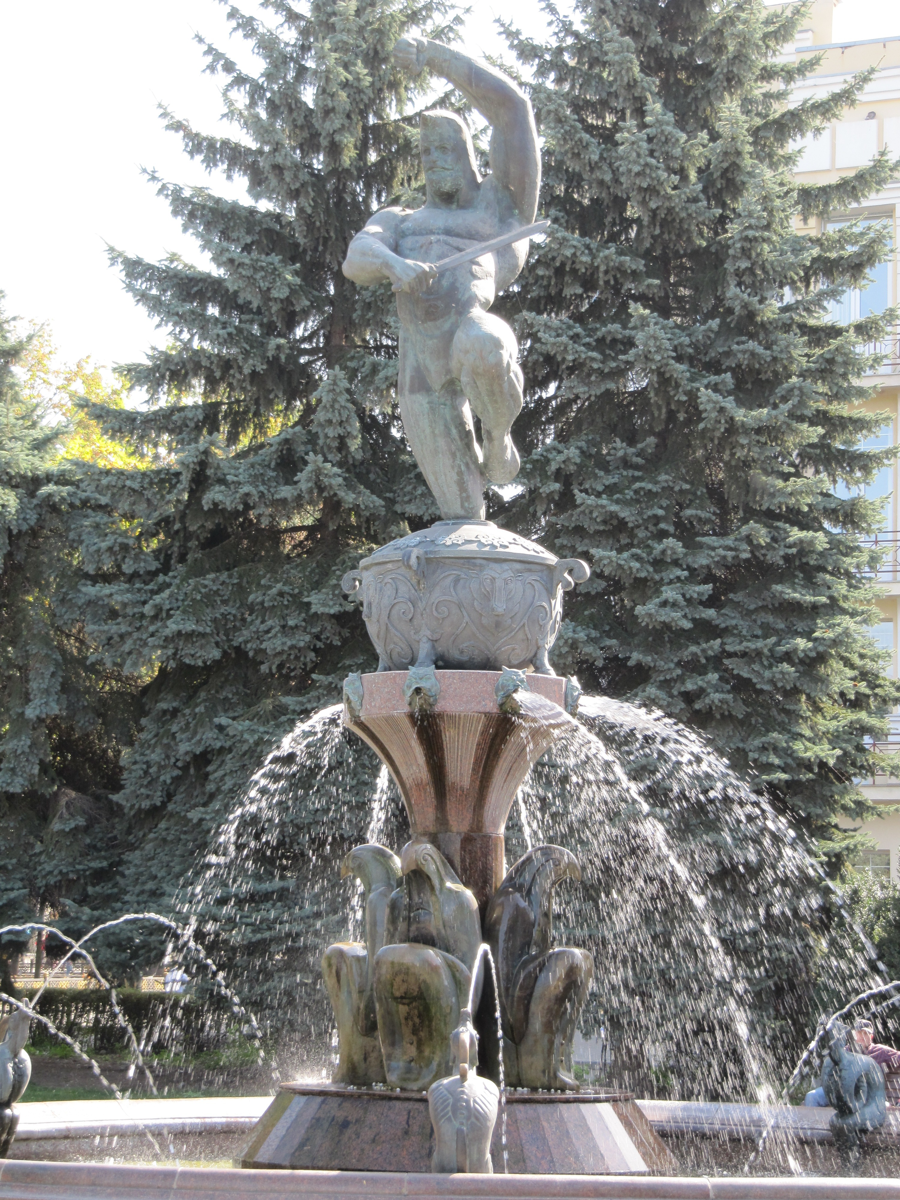 Фонтан "Сослан на чаше Уацамонга", Владикавказ, Северная Осетия